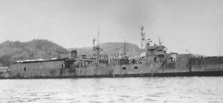 復員庁特別輸送艦『輸第十三号』（元日本海軍第一号型輸送艦『第十三号輸送艦』）、横須賀沖